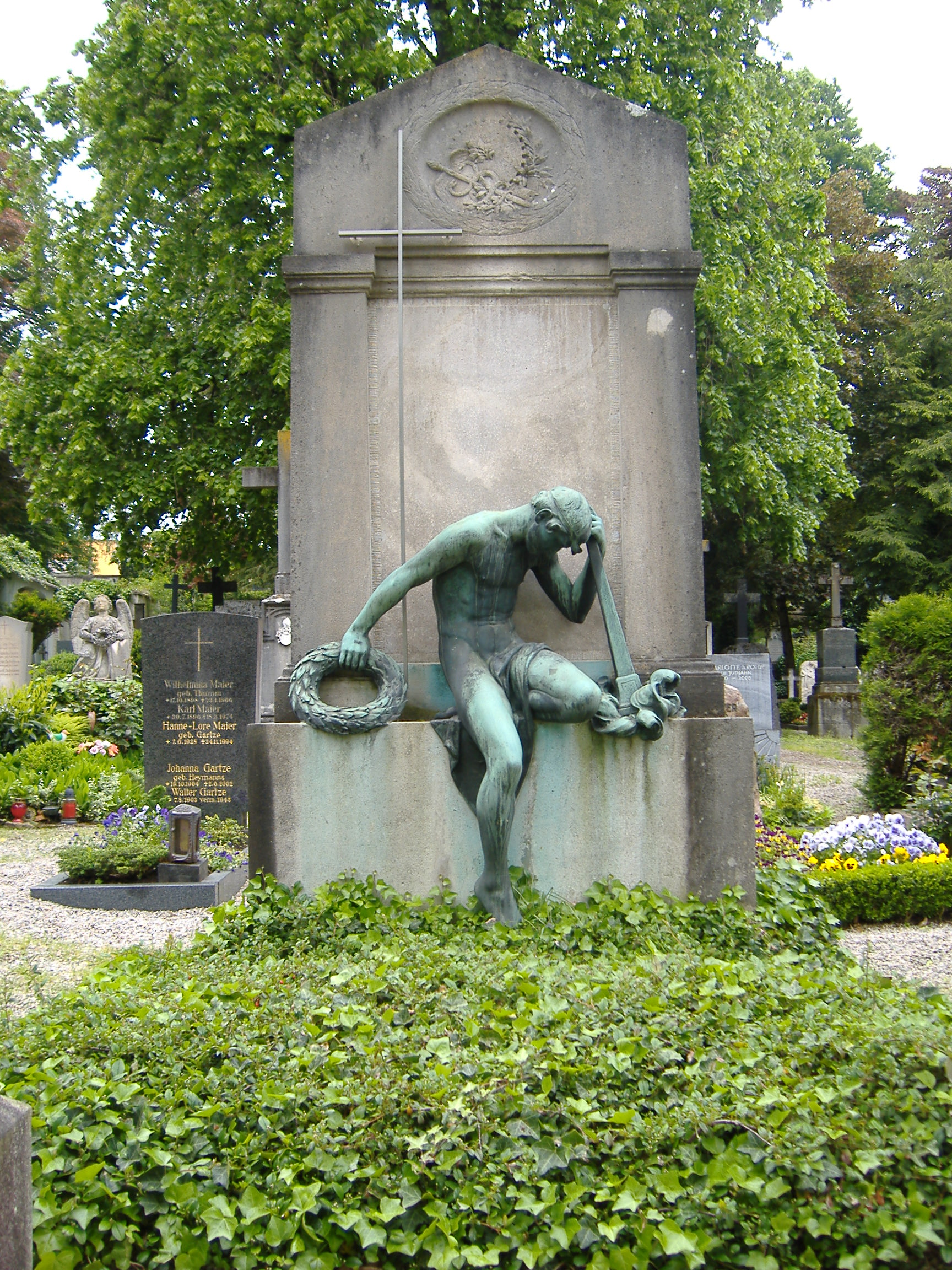 Grabstaätte von Wilhelm Butz